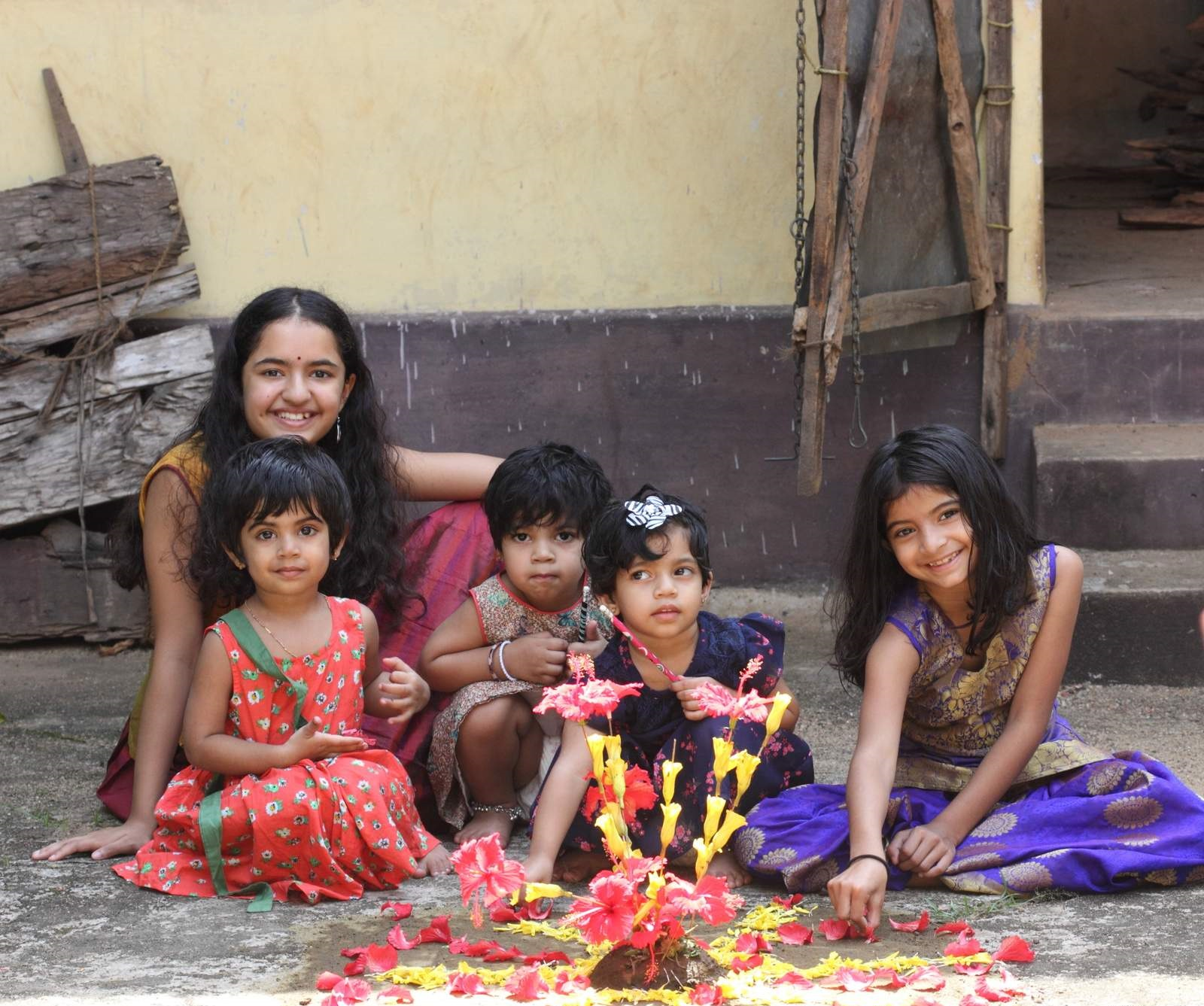 അത്തം ഇടുന്ന കുട്ടികള്‍